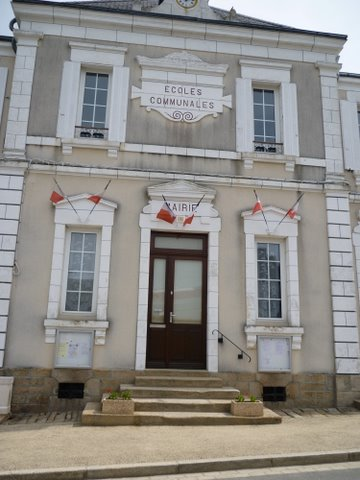 mairie Mouhet